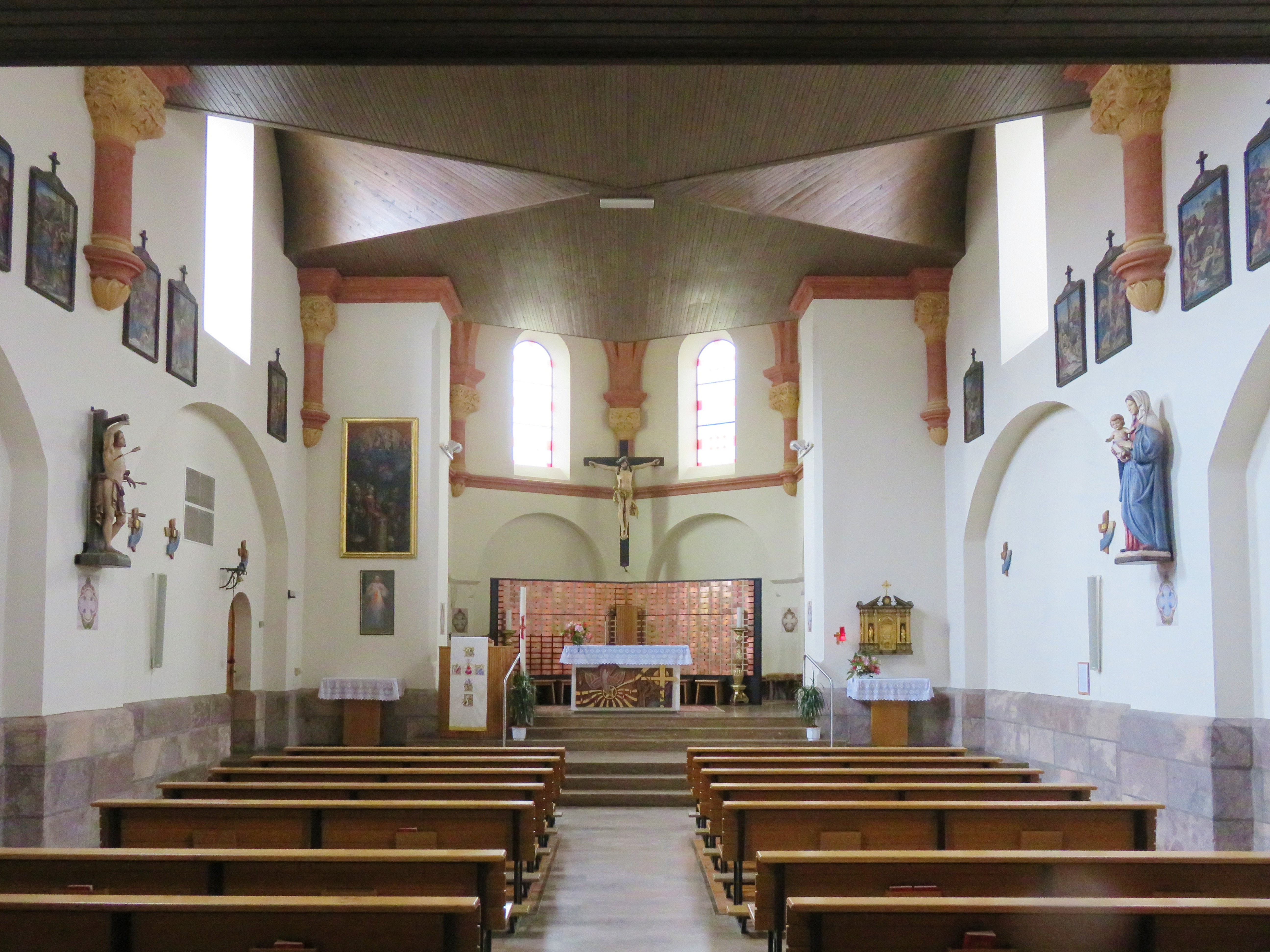 Chiesa di San Sebastiano - Cavalese. Navata con altare e Cristo ligneo.